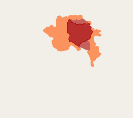 Parte 2